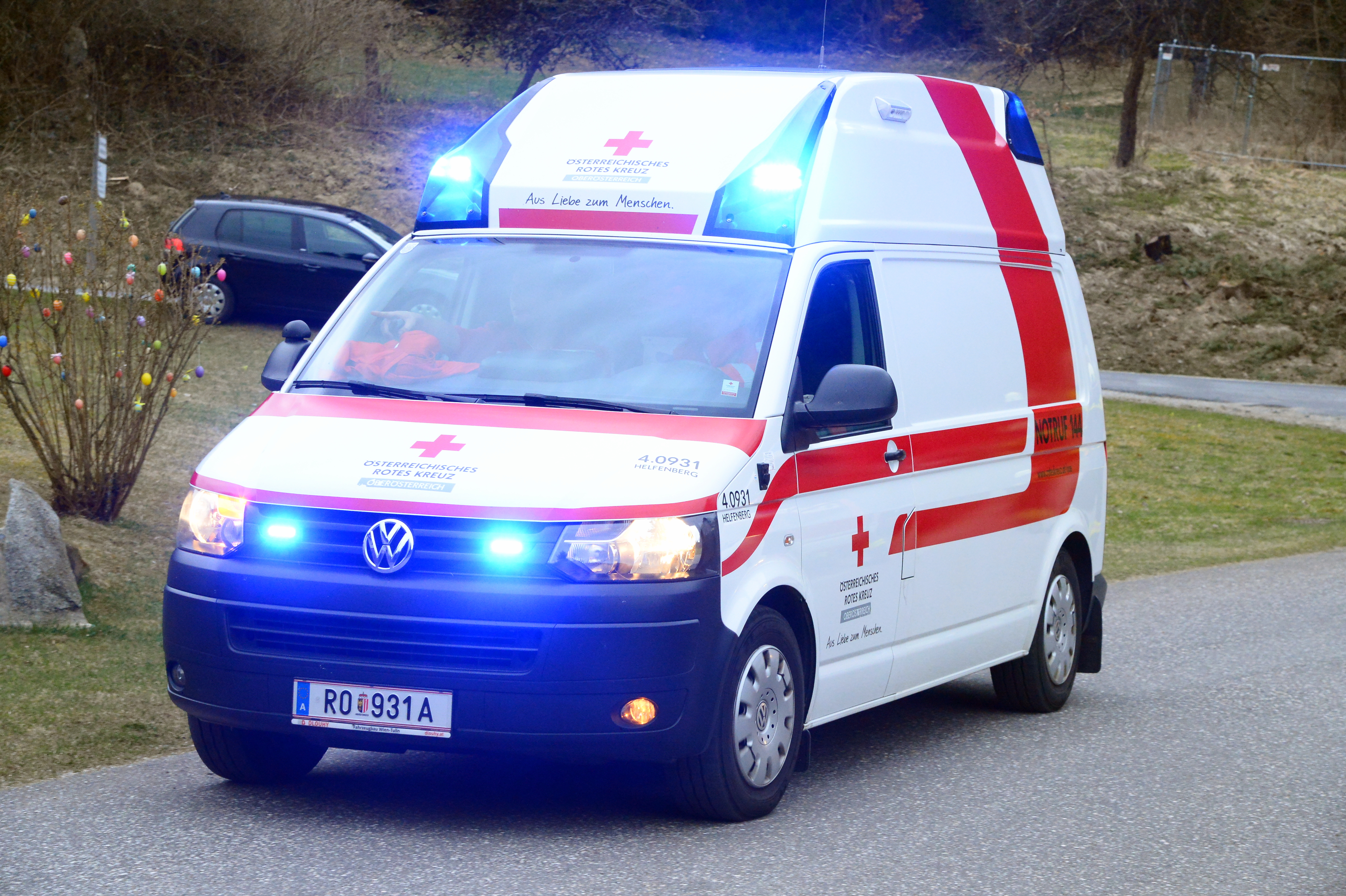 Pflichtbereichsübung in Vorderweißenbach im Mühlviertel der Feuerwehren und Rotem Kreuz